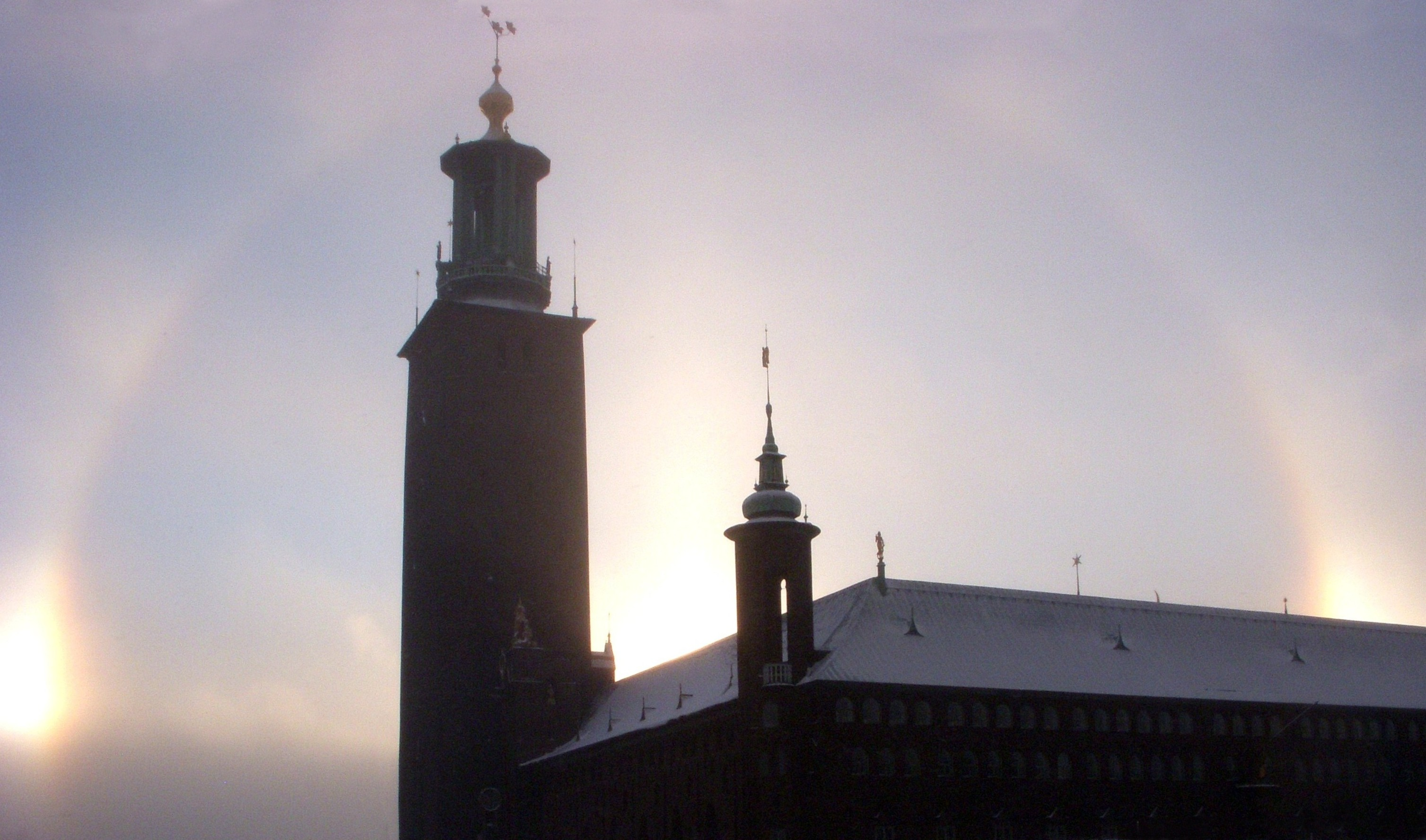 Halos effekt bakom Stockholms stadshus